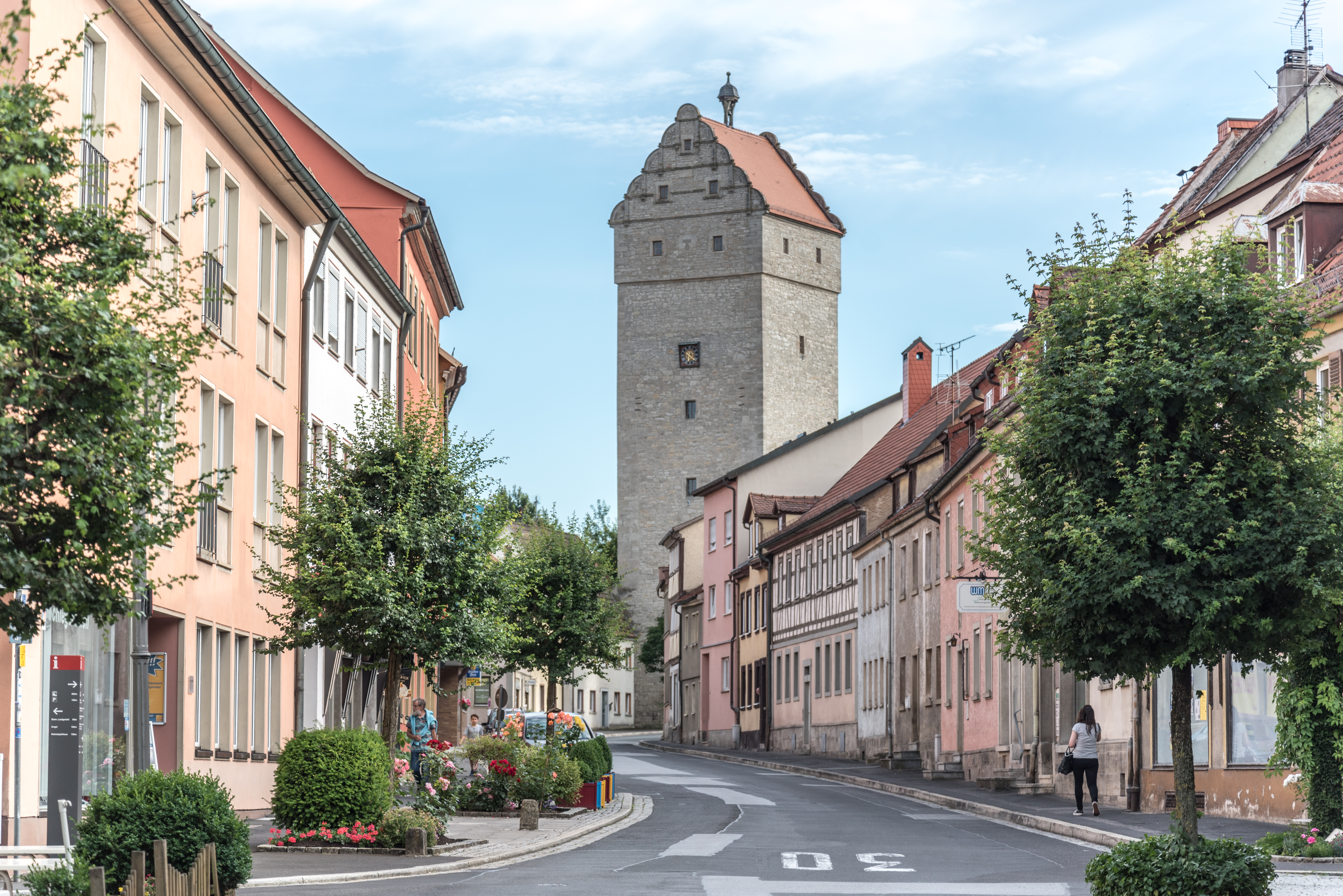 Münnerstadt, Veit-Stroß-Straße, Oberes Tor